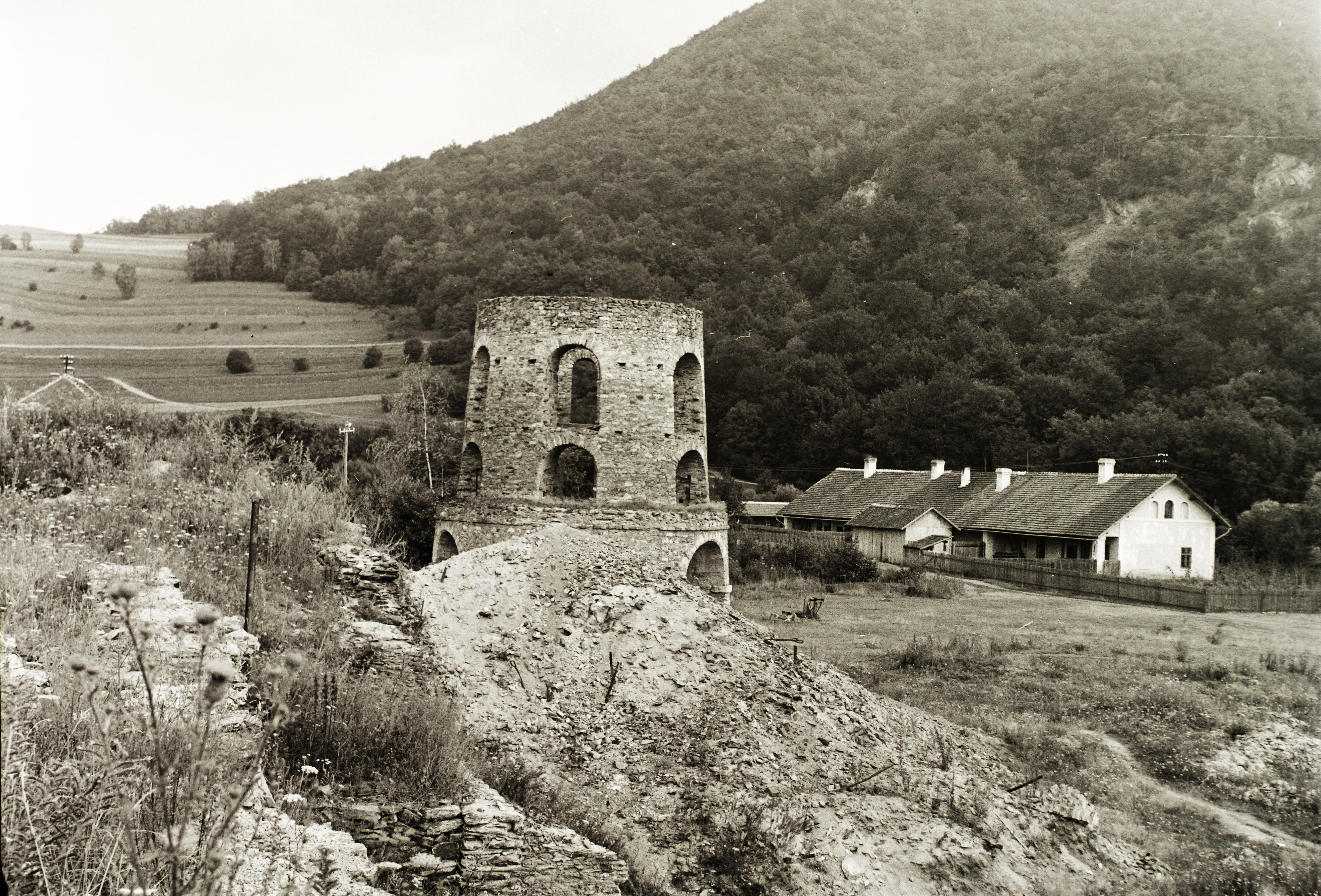 a vasgyár maradványai. Location: Slovakia, Drnava Title: a vasgyár maradványai.